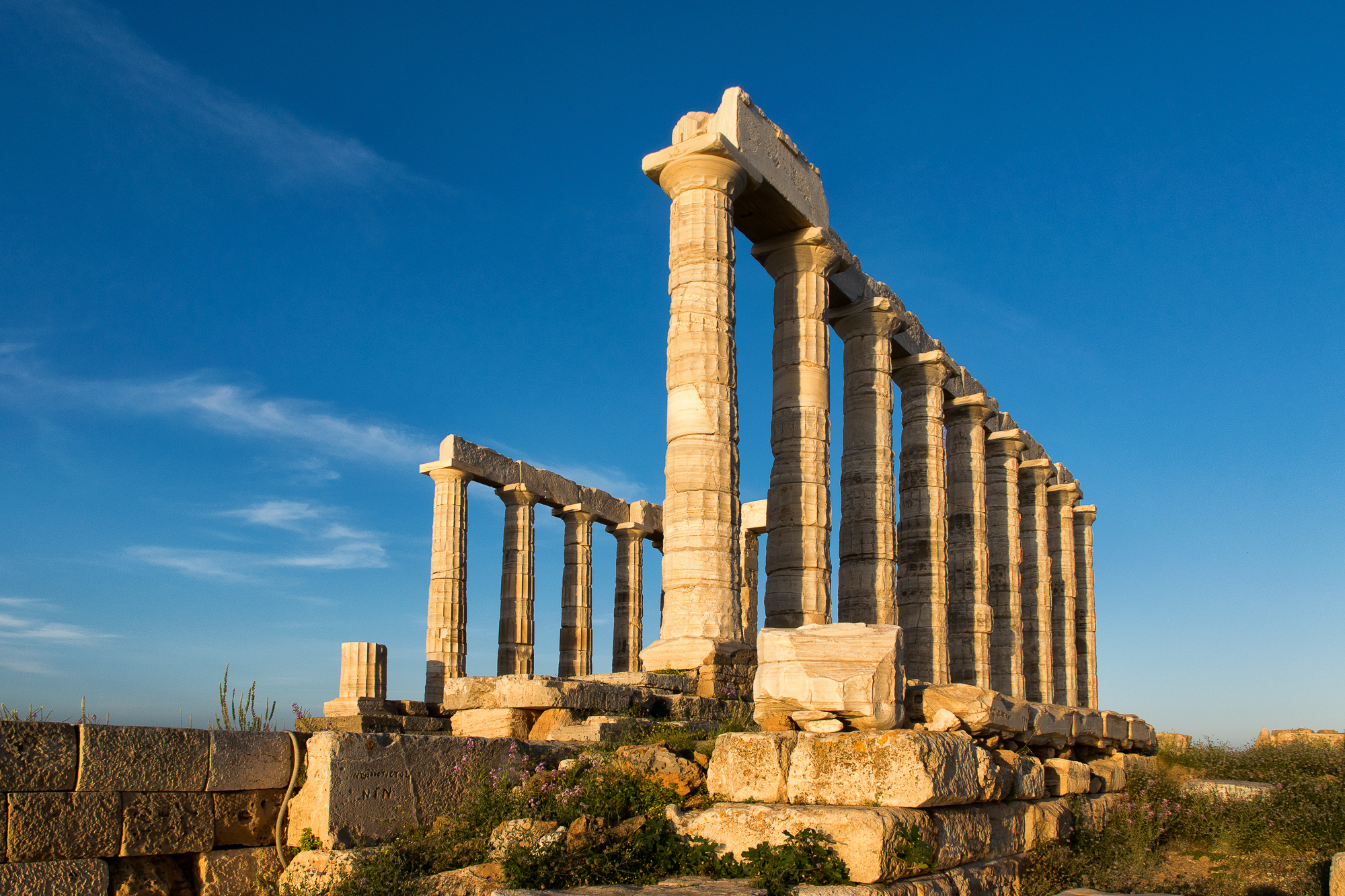 Σούνιο, αρχαιολογικός χώρος«Σούνιο, αρχαιολογικός χώρος»